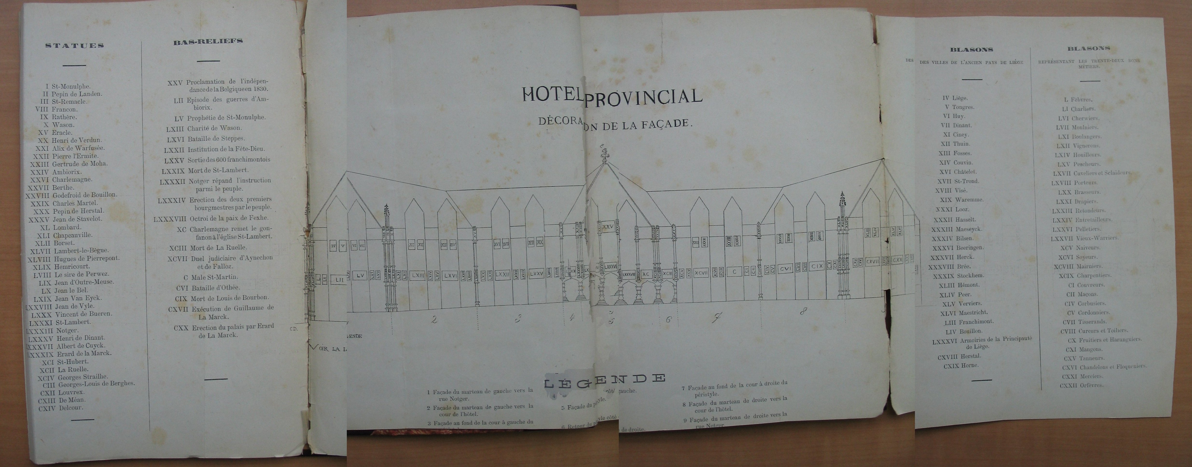 Plan de la façade néogothique du Palais provincial de Liège (positions des blasons, statues et panneaux). Photo-montage à partir du livre Ornementations de la façade du Palais des Princes-Évêques de Liège par Charles de Luesemans, gouverneur en 1878. (Chiroux - salle de lecture) (voir aussi page 12 de Parcours d'Art public (dossier pédagogique) de la ville de Liège)